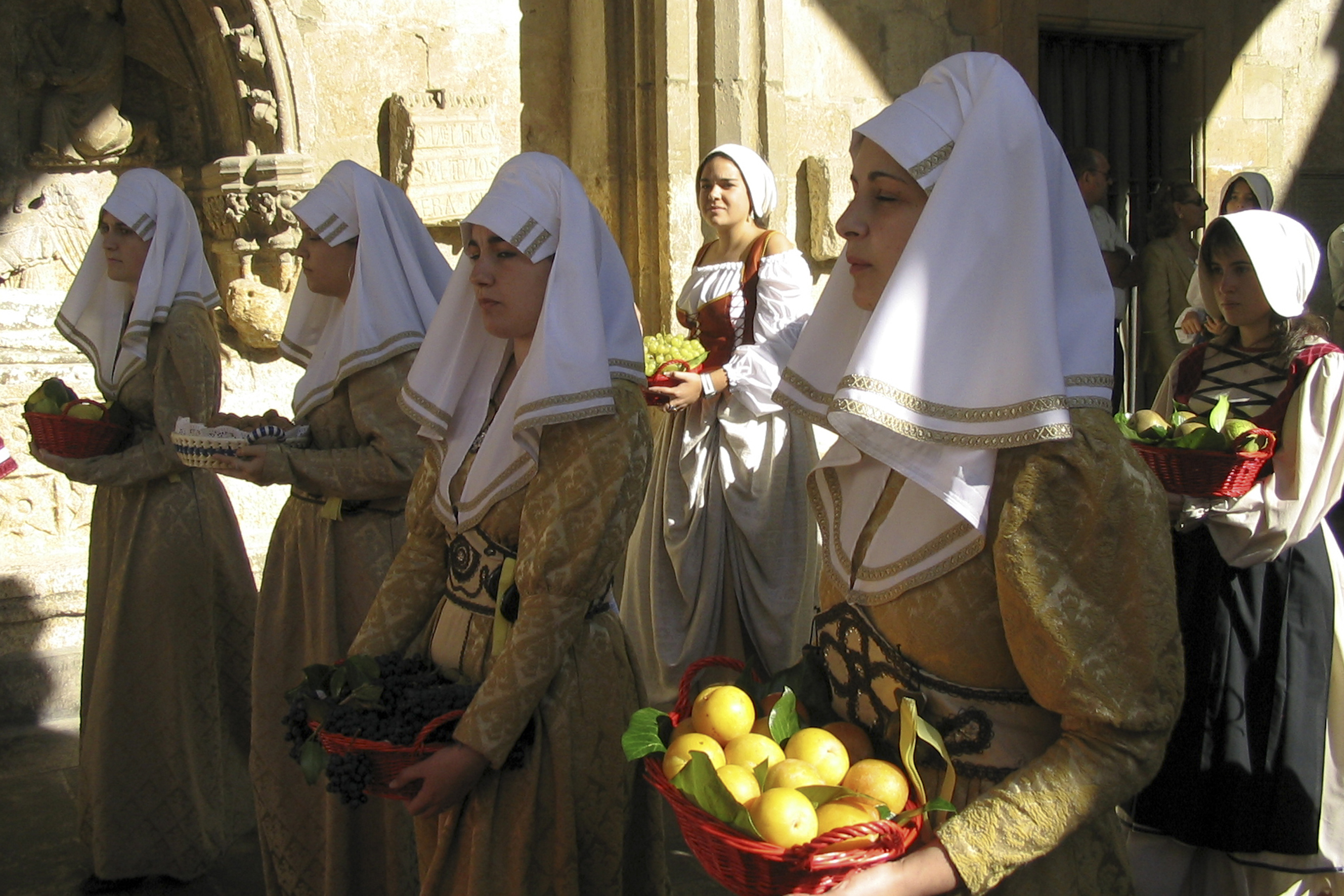 Fiesta de las Cantaderas. León, España. Octubre de 2004. This is a photography of a Folklore festival in Spain (Wikidata id Q17636451).